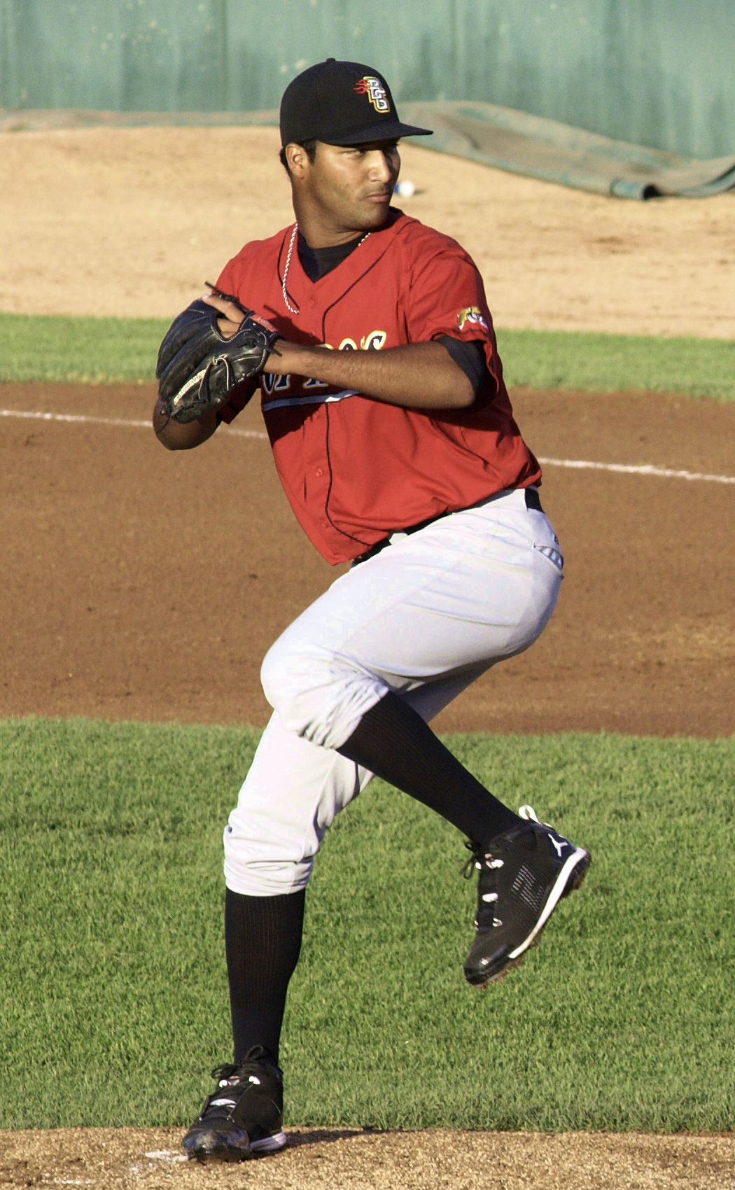 Wilking Rodríguez